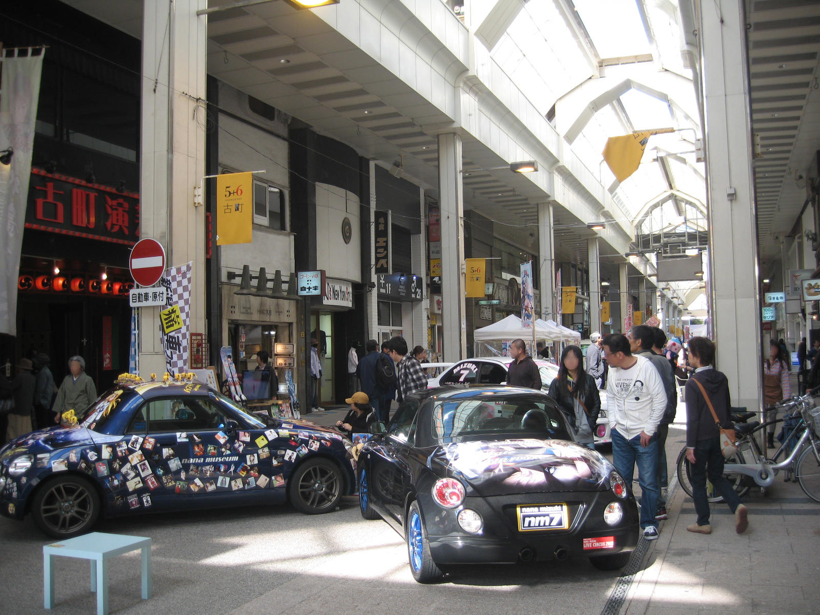 新潟市中央区のイベント、がたふぇすの古町会場(古町通6番町)の様子。